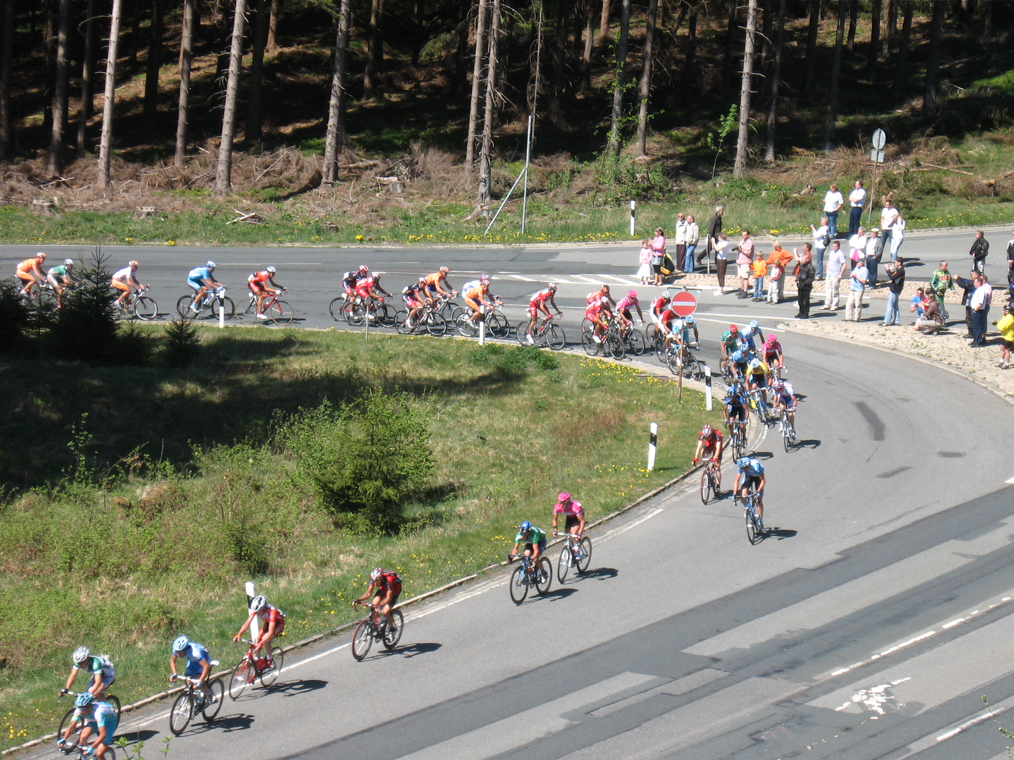 Niedersachsen-Rundfahrt 2007 am Sperberhaier Damm